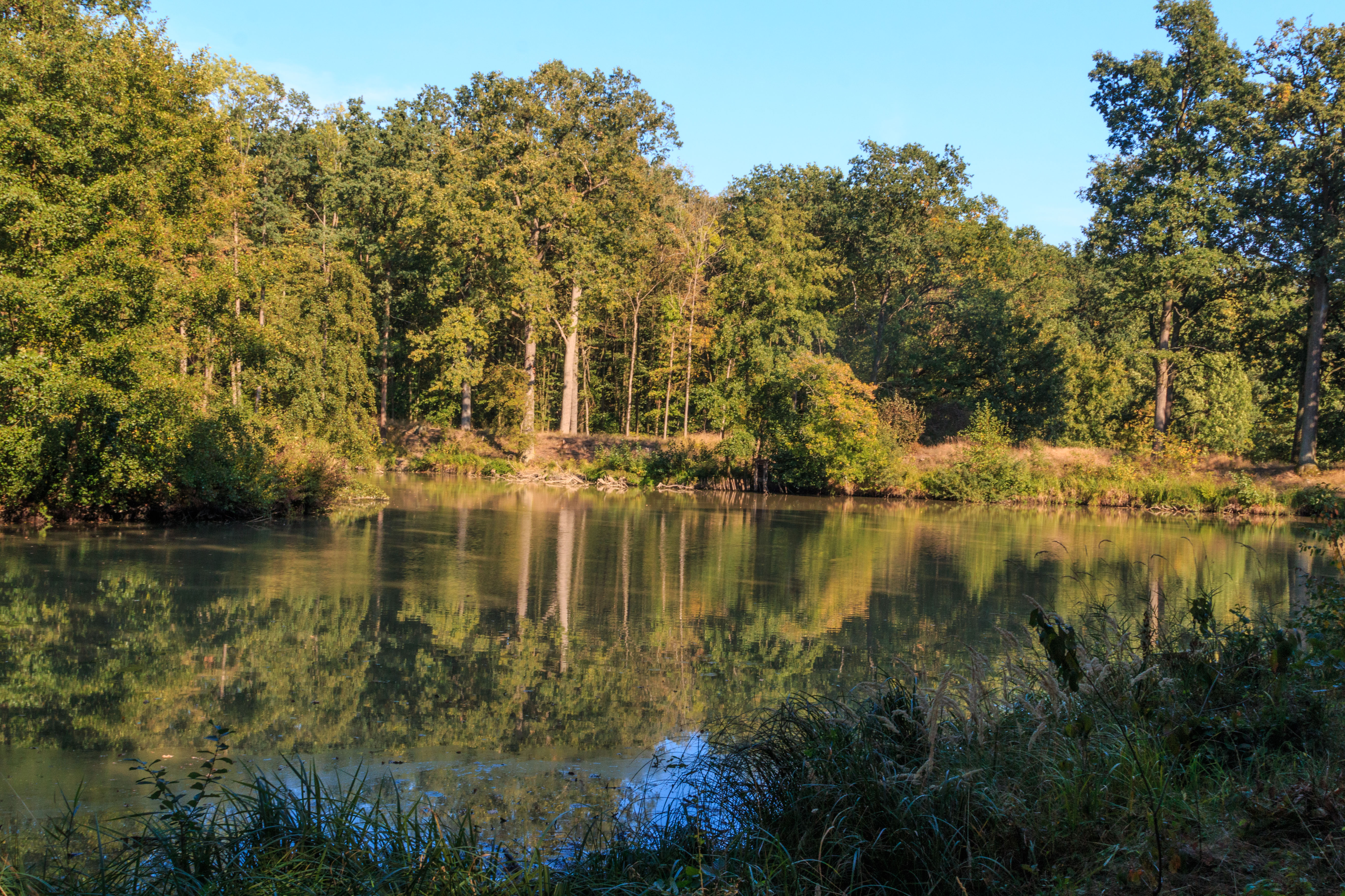 Rybník Jelítko u Budína Project: Vodstvo.